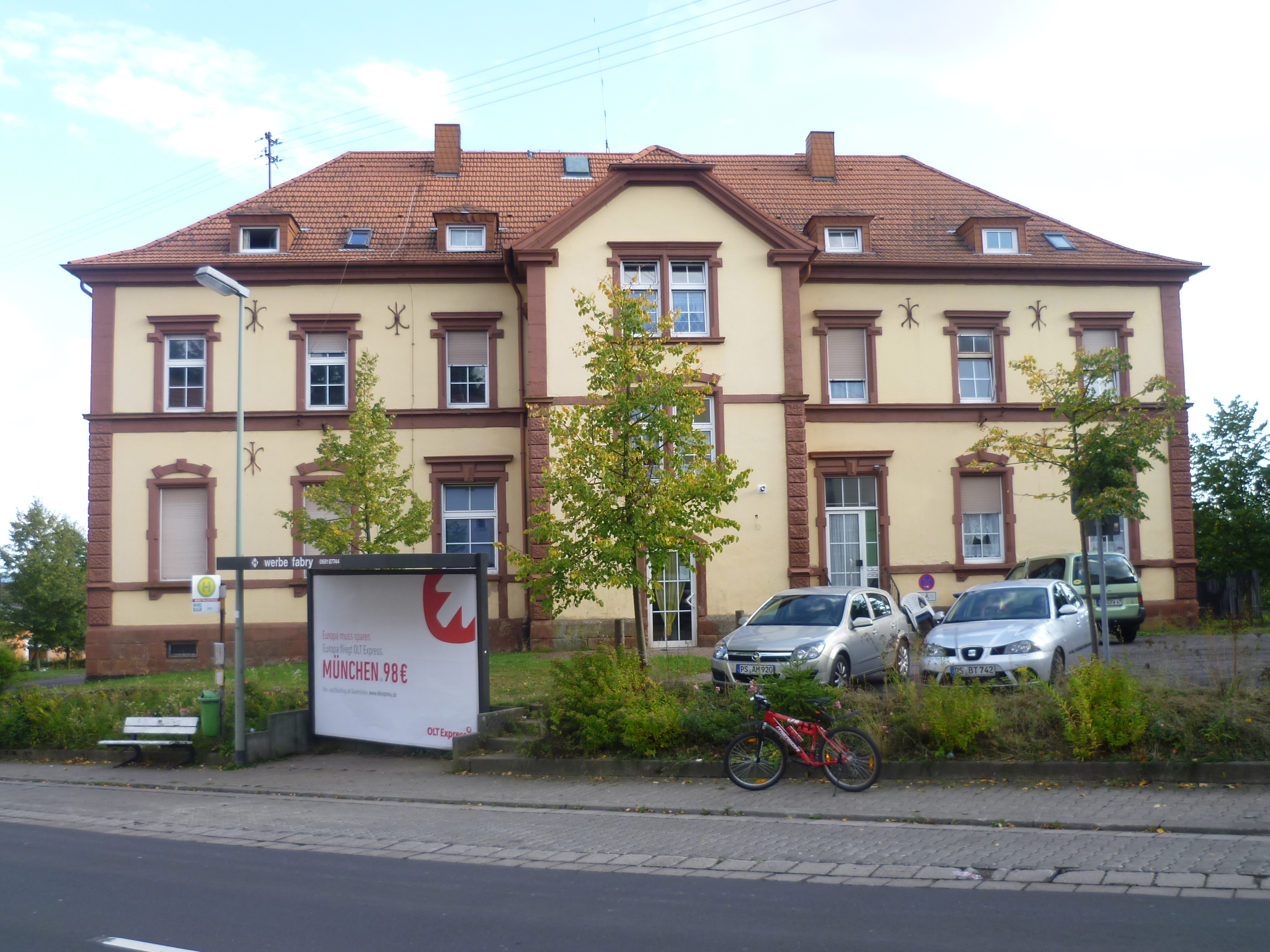 Schule Lage: Höcherbergstraße 39 Errichtet: 1902–04